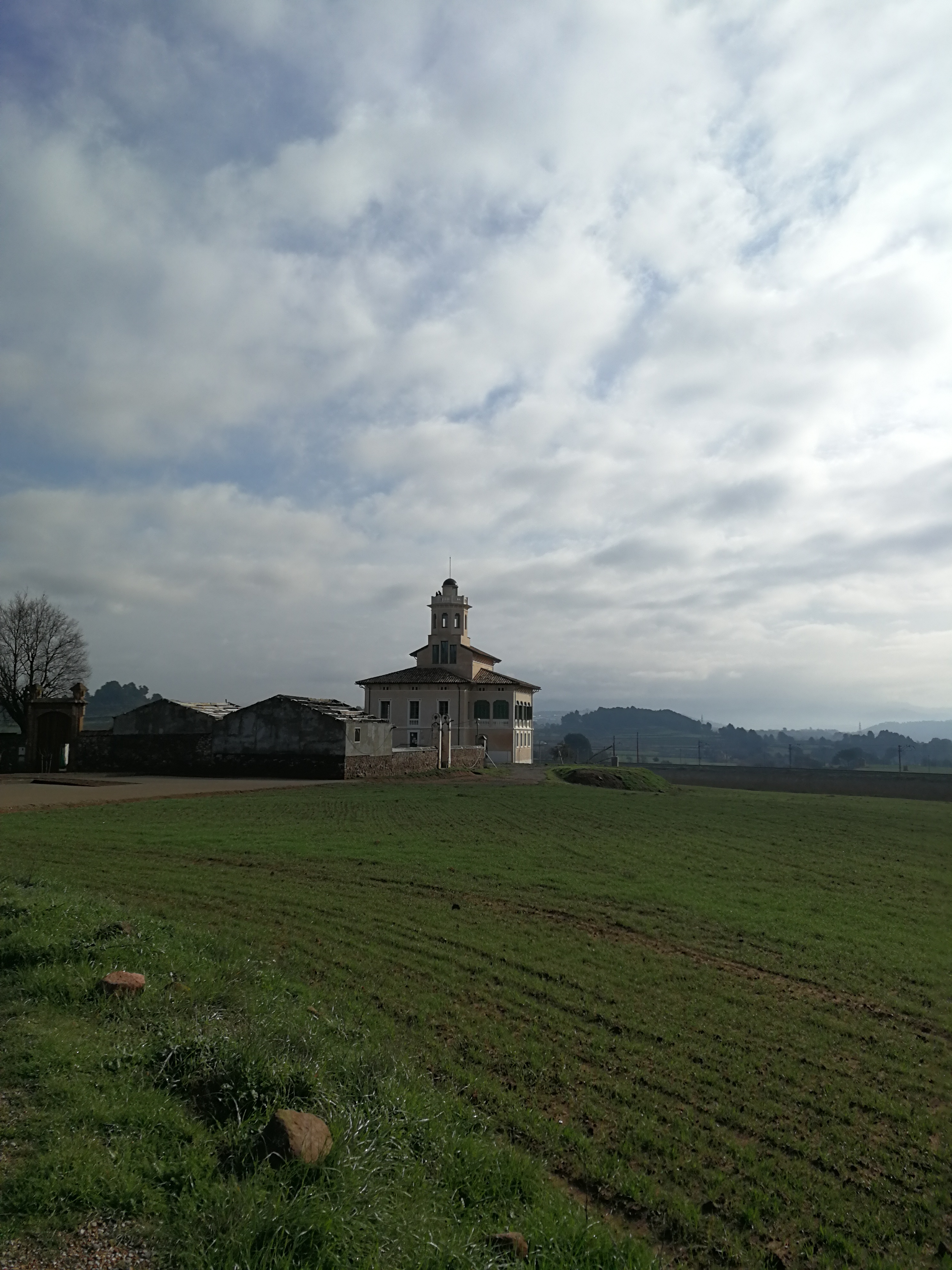 Vista Exterior de la Torre Lluvià o Vila Emília de l'arquitecte Ignasi Oms i Ponsa